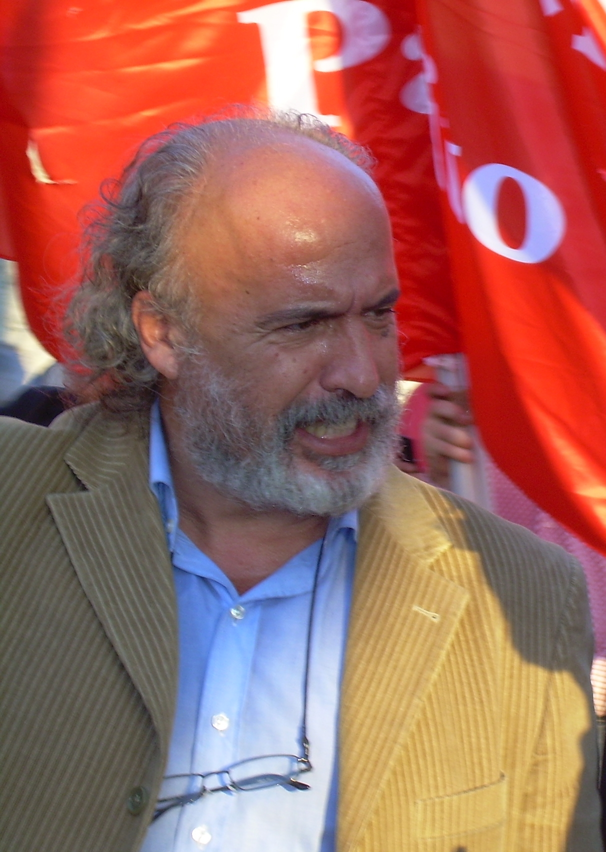 Marco Ferrando parla coll'esecutivo del Partito Comunista dei Lavoratori alla manifestazione delle sinistre dell'11 ottobre 2008 a Roma.